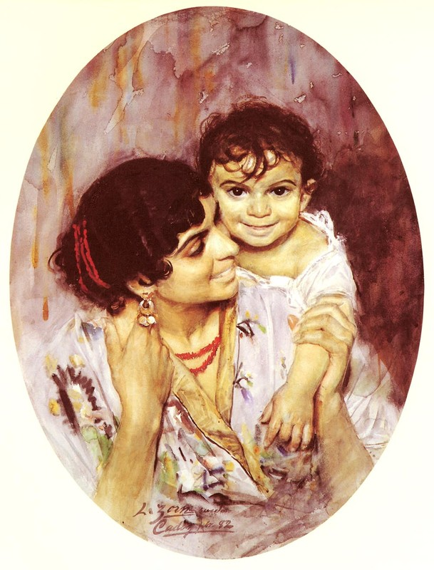 Modersglädjelabel QS:Lsv,"Modersglädje"